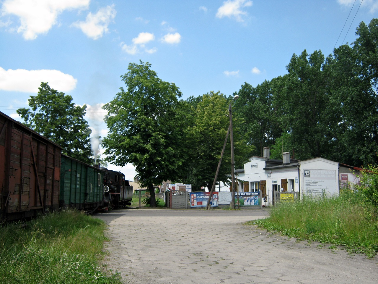 PX48-1919 z pociągiem towarowo-osobowym odjeżdża ze stacji Witkowo, czerwiec 2013